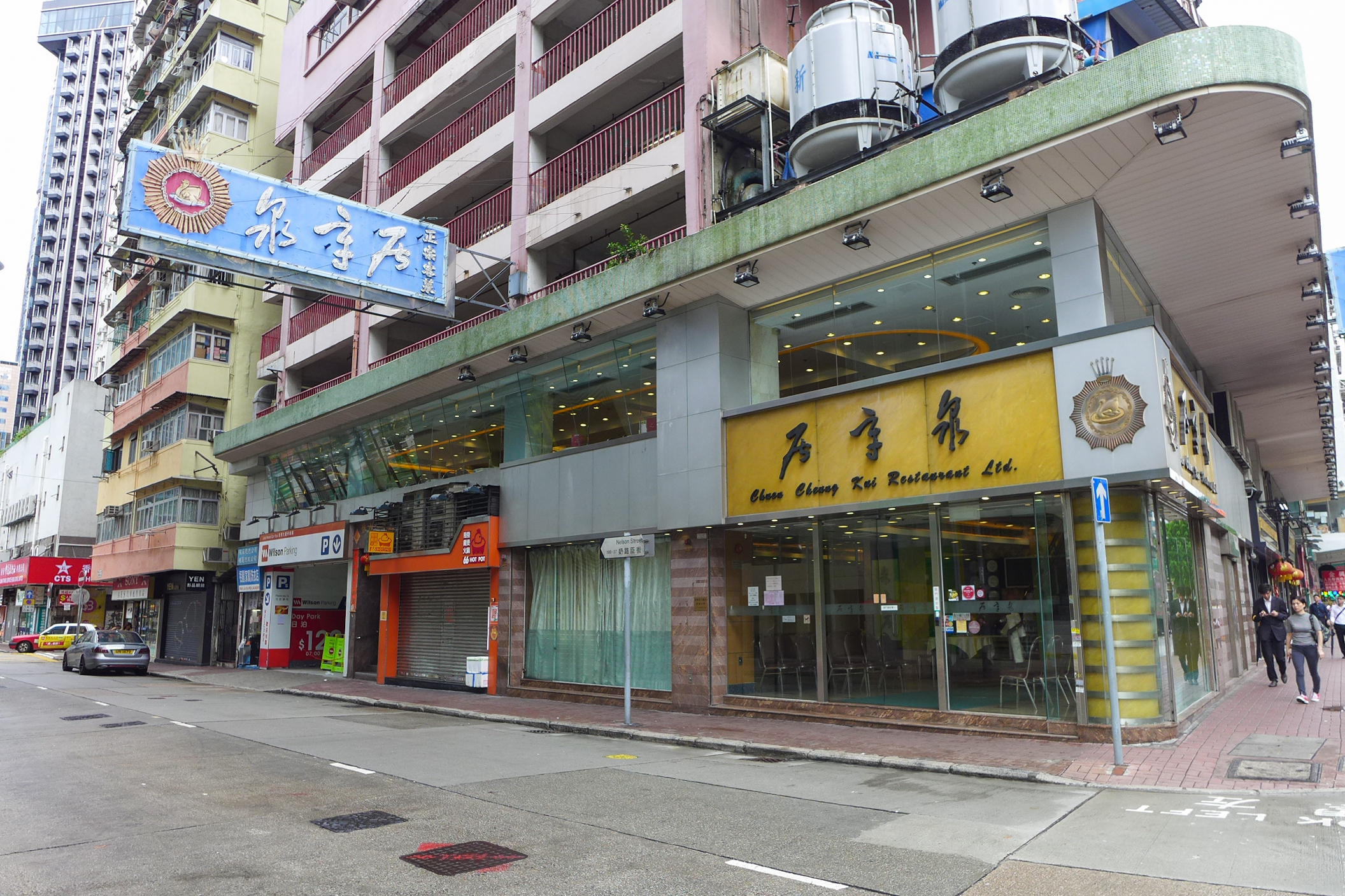 Chuen Cheung Kui Restaurant in Mong Kok